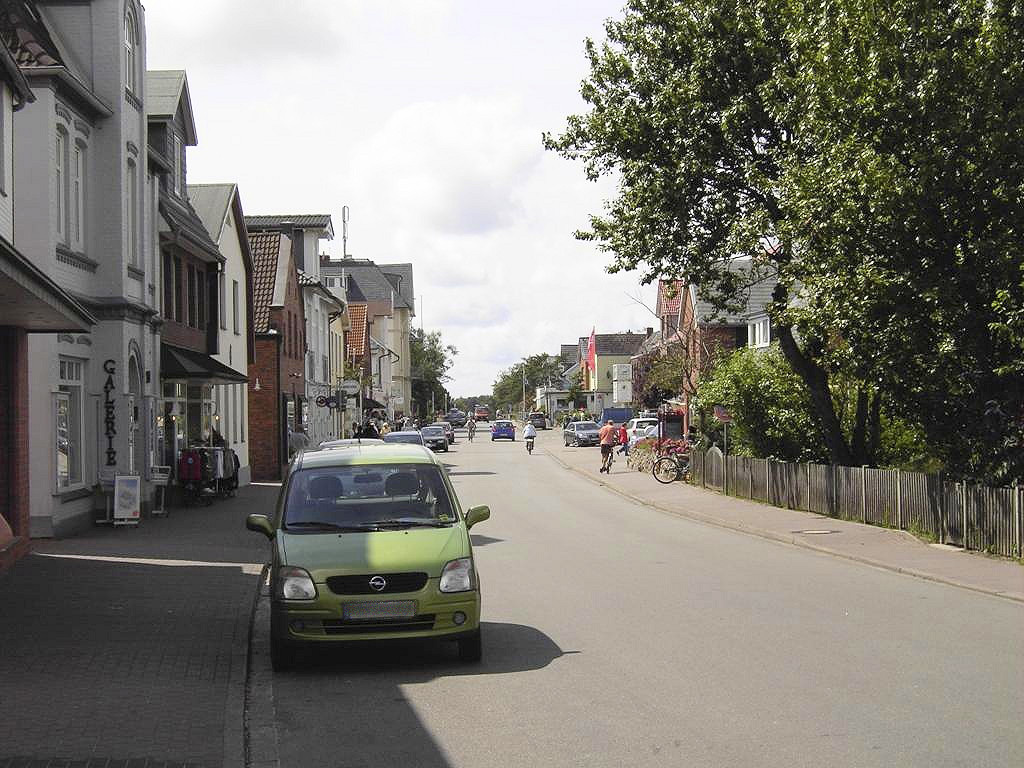 Wittdün, Amrum